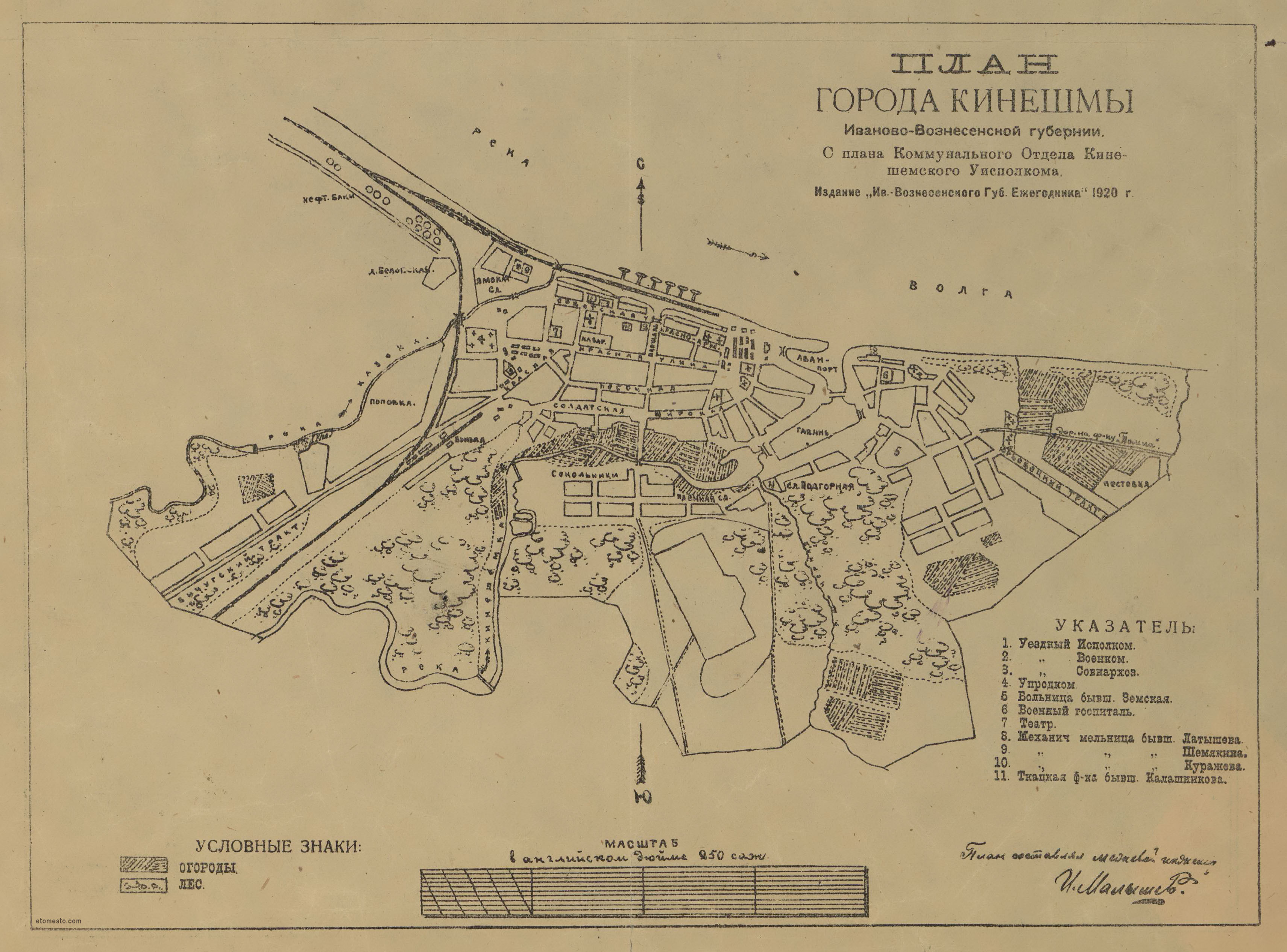 План города Кинешмы Иваново-Вознесенской губернии, 1920 год